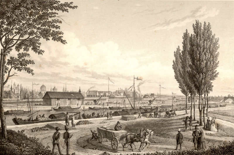 Der Kanalhafen von Nürnberg gegen Nord-Ost. Stahlstich von Alexander Marx aus dem Buch Pittoreske Ansichten des Ludwig-Donau-Main-Kanals. Gezeichnet, auf Stahl gestochen und herausgegeben von Alexander Marx. 1845. Kupferstecher in Nürnberg.